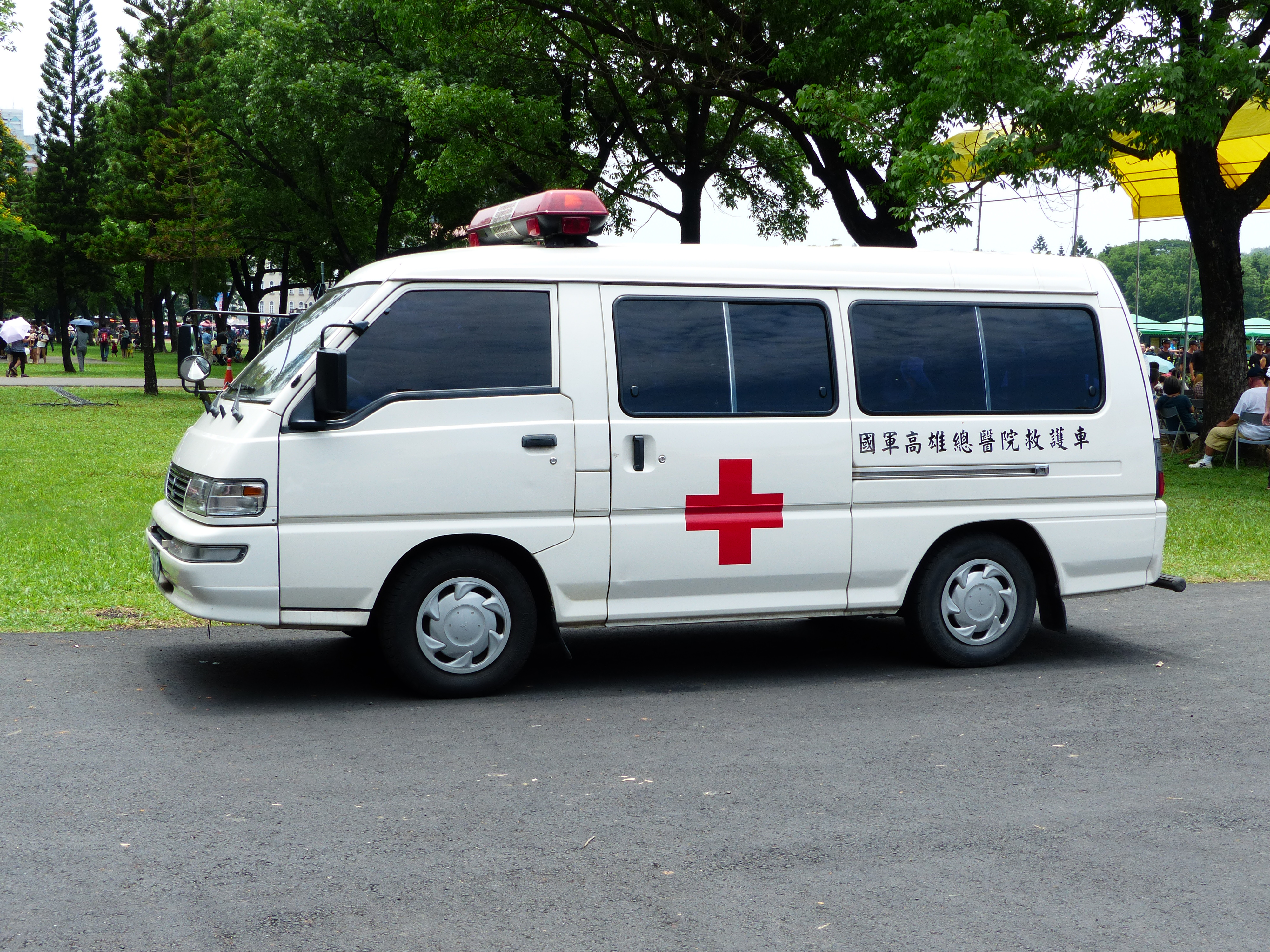 2014年陸軍官校營區開放活動，北司令臺東側醫療站的國軍高雄總醫院中華三菱得利卡救護車。